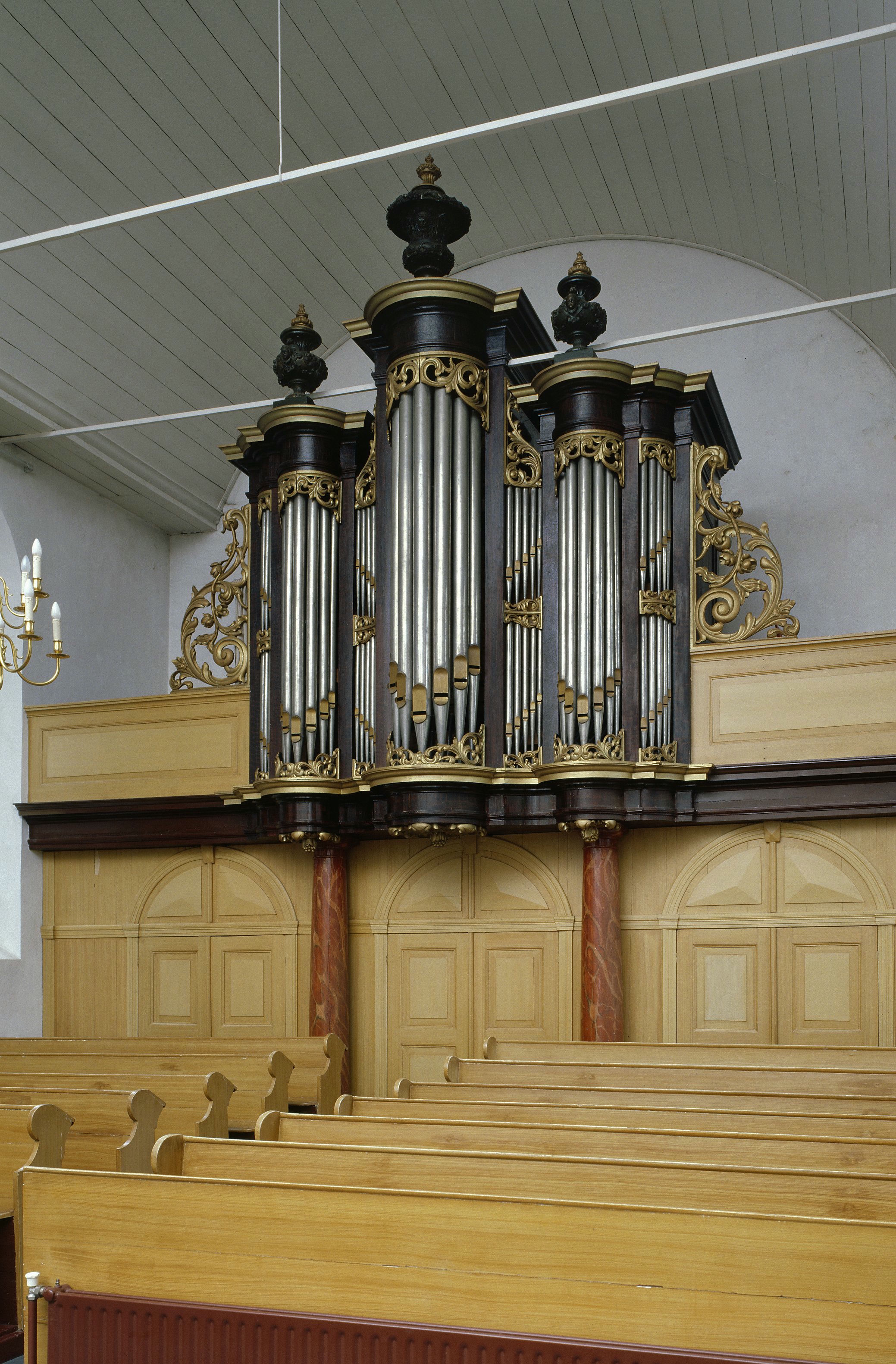 Nederlands Hervormde Kerk: Interieur, aanzicht orgel, orgelnummer 1208 (opmerking: Gefotografeerd voor Het Historische Orgel in Nederland 1865-1872)